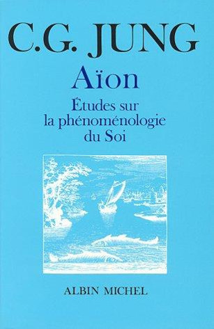 Couverture de l'essai écrit par C. G. Jung intitulé « Aïon. Études sur la phénoménologie du Soi » (1951) édition Albin Michel 1983